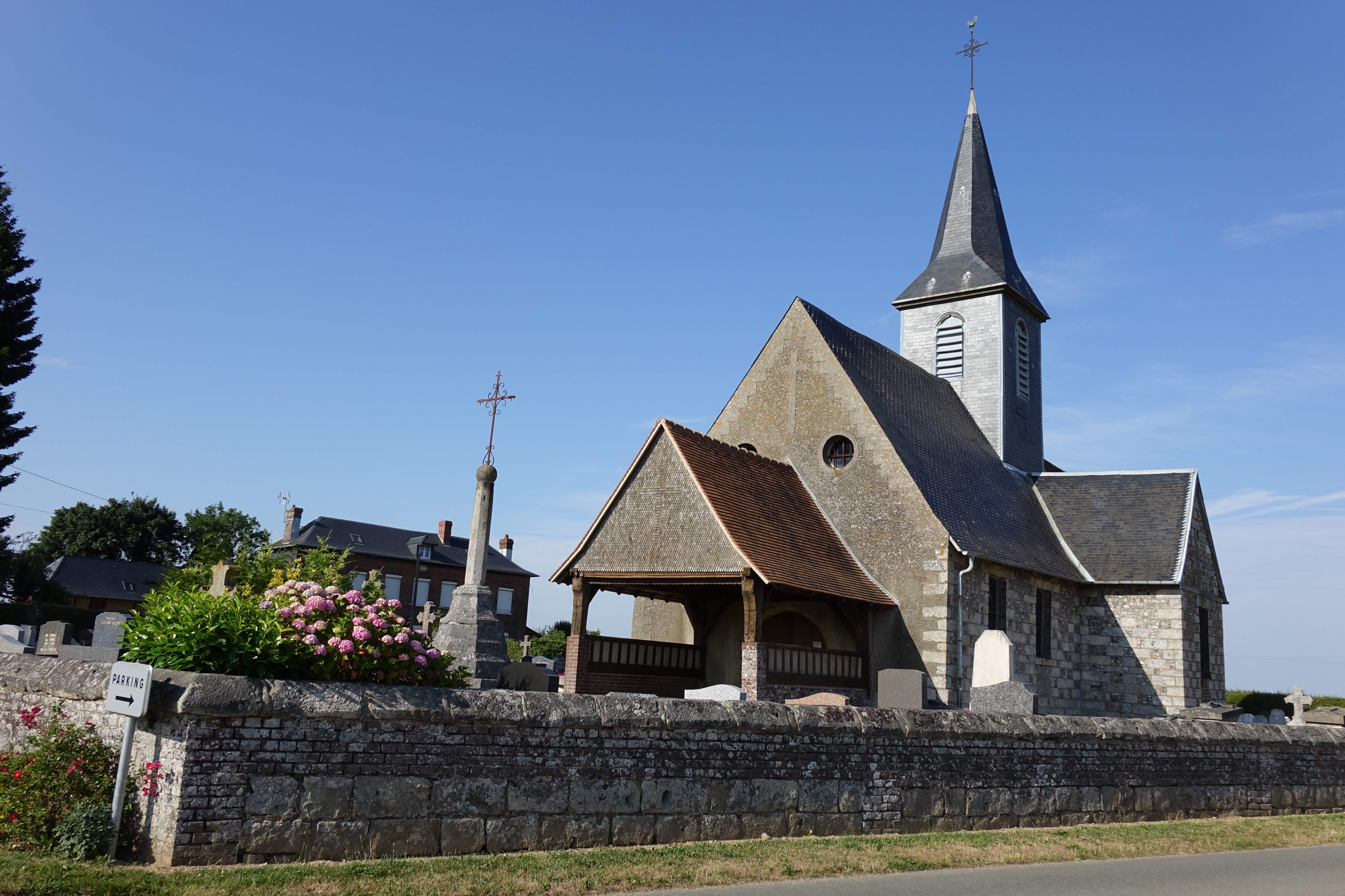 Église de Morgny-la-Pommeray, Seine-Maritime, France